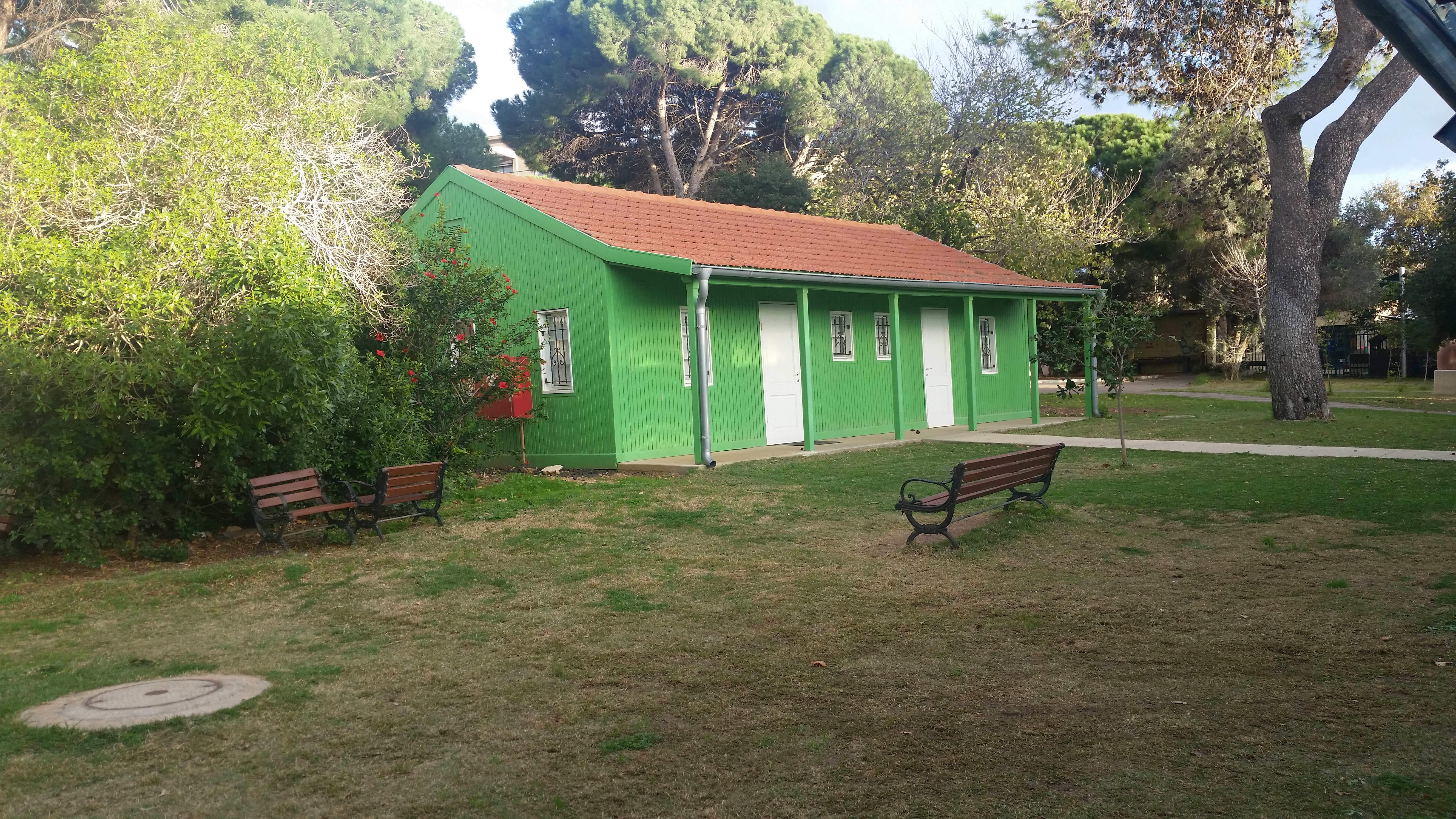 צריף בקמפוס בית בירם שבעבר למדו בו תלמידים היום משמש כמוזיאון המוסד